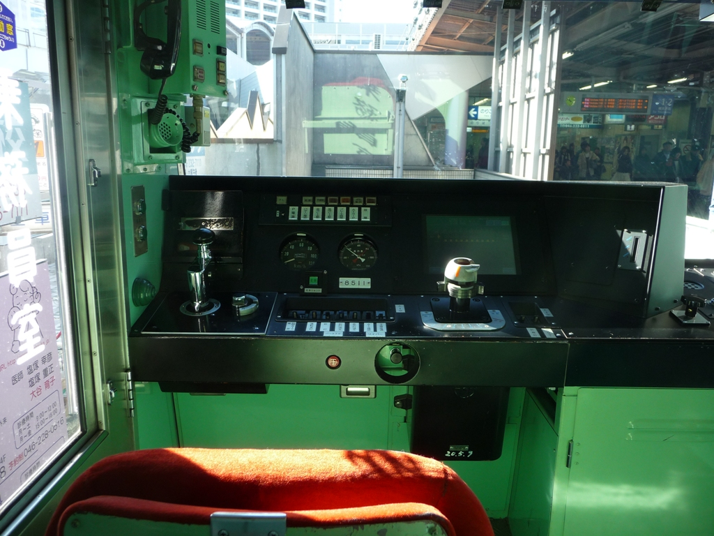 相鉄8000系更新車（8711F）の運転台